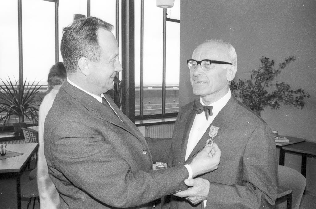 Der Kulturattaché der Französischen Botschaft in Bonn Prof. Dr. Cheval überreicht dem Direktor des Instituts für Klassische Altertumskunde der Christian-Albrechts-Universität (CAU) in Würdigung seiner Verdienste um die deutsch-französische Freundschaft den Orden Palmes Académiques.